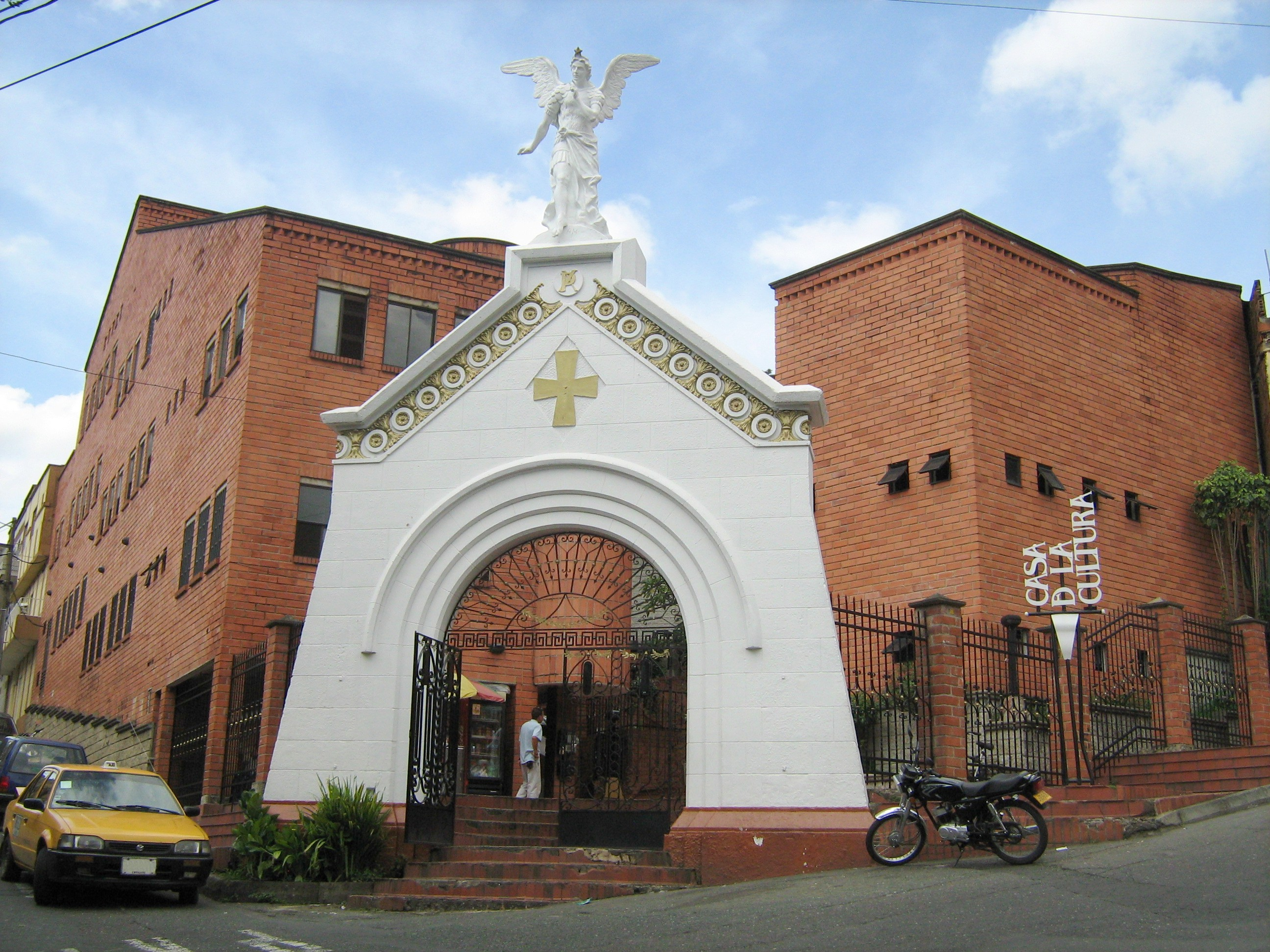 Casa de al Cultura del Municipio de Bello. Antioquia. Colombia